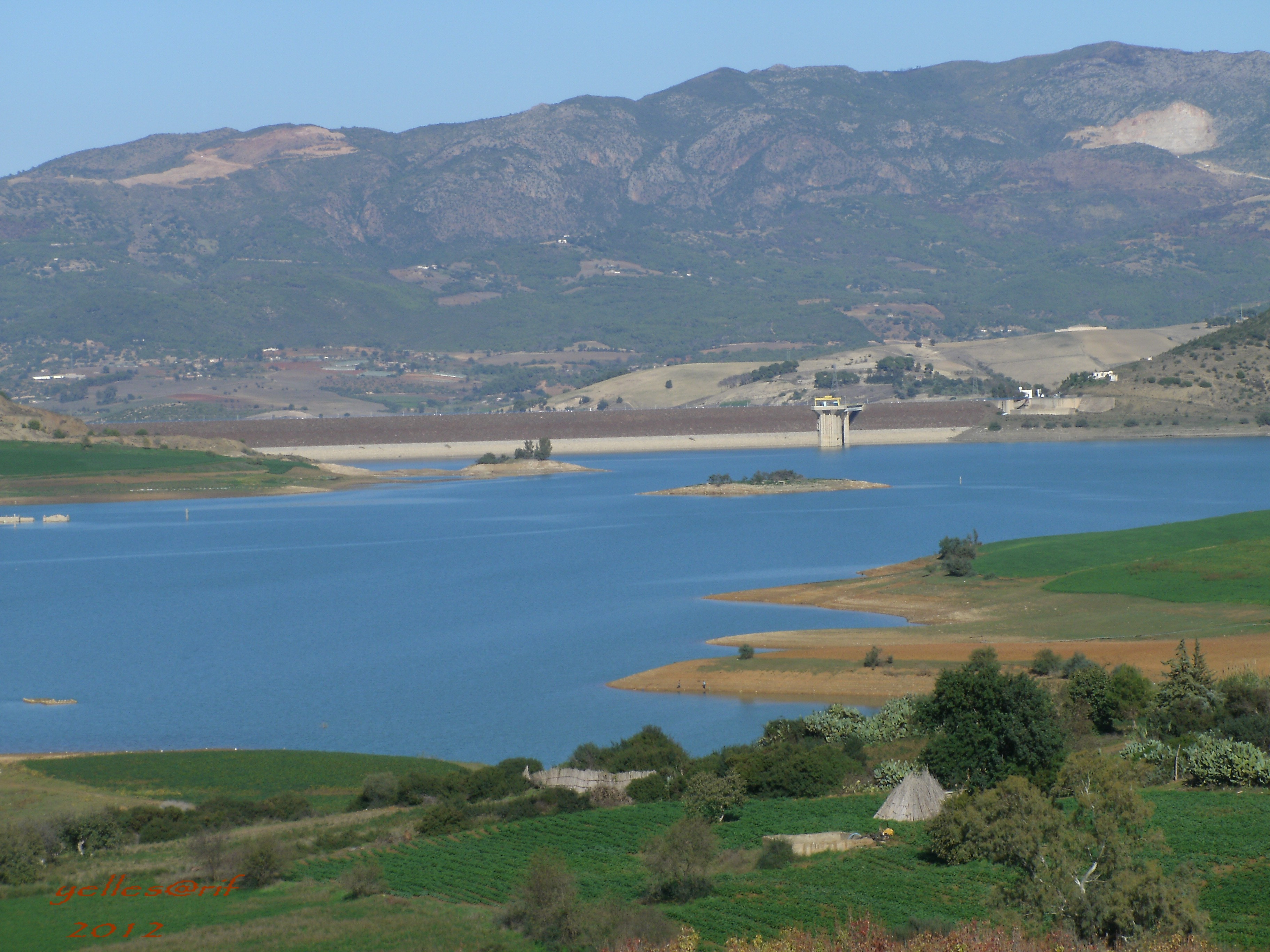 Le barrage de Boukerdene à Sidi Amar dans la wilaya de Tipaza